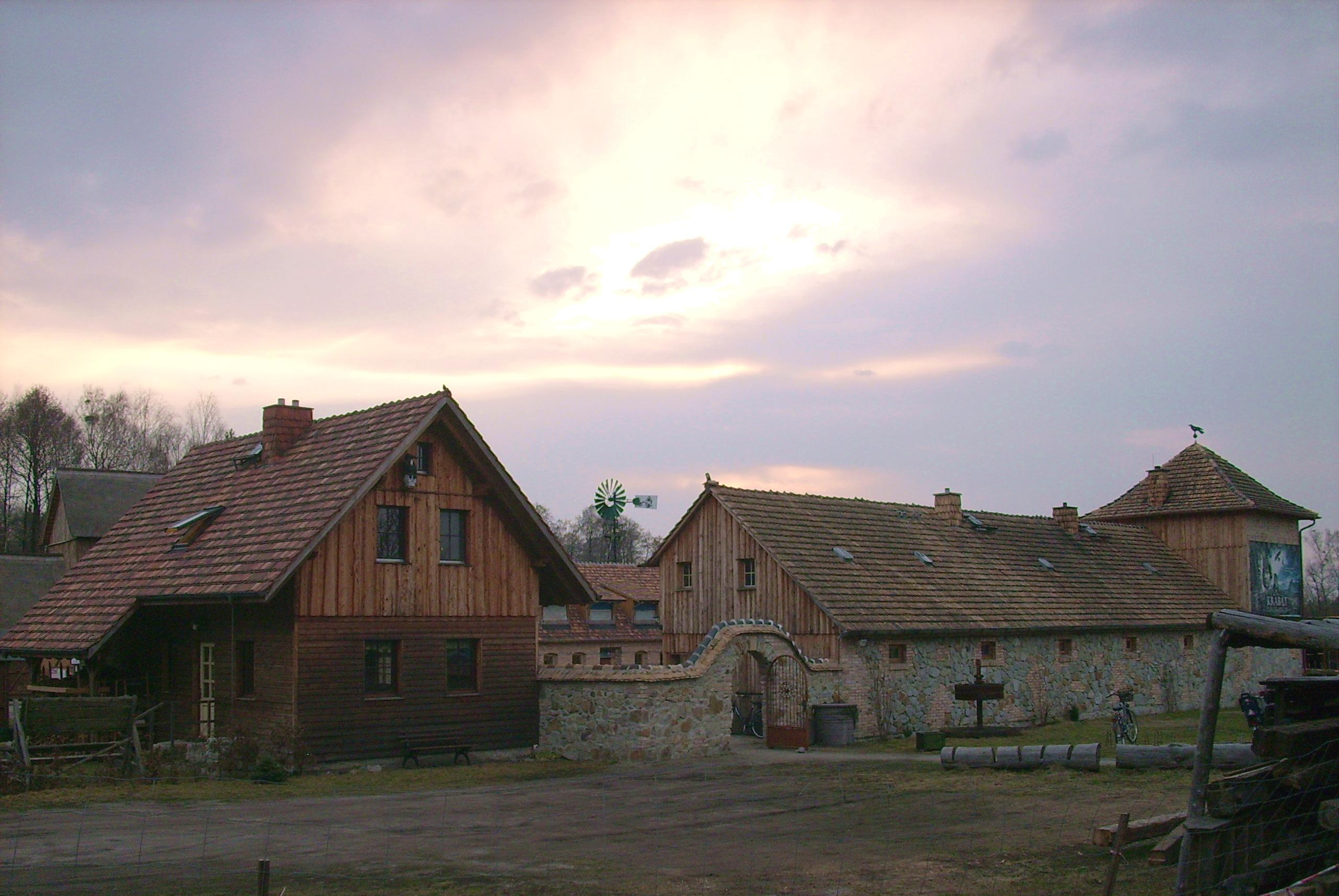 Krabatmühle in Schwarzkollm